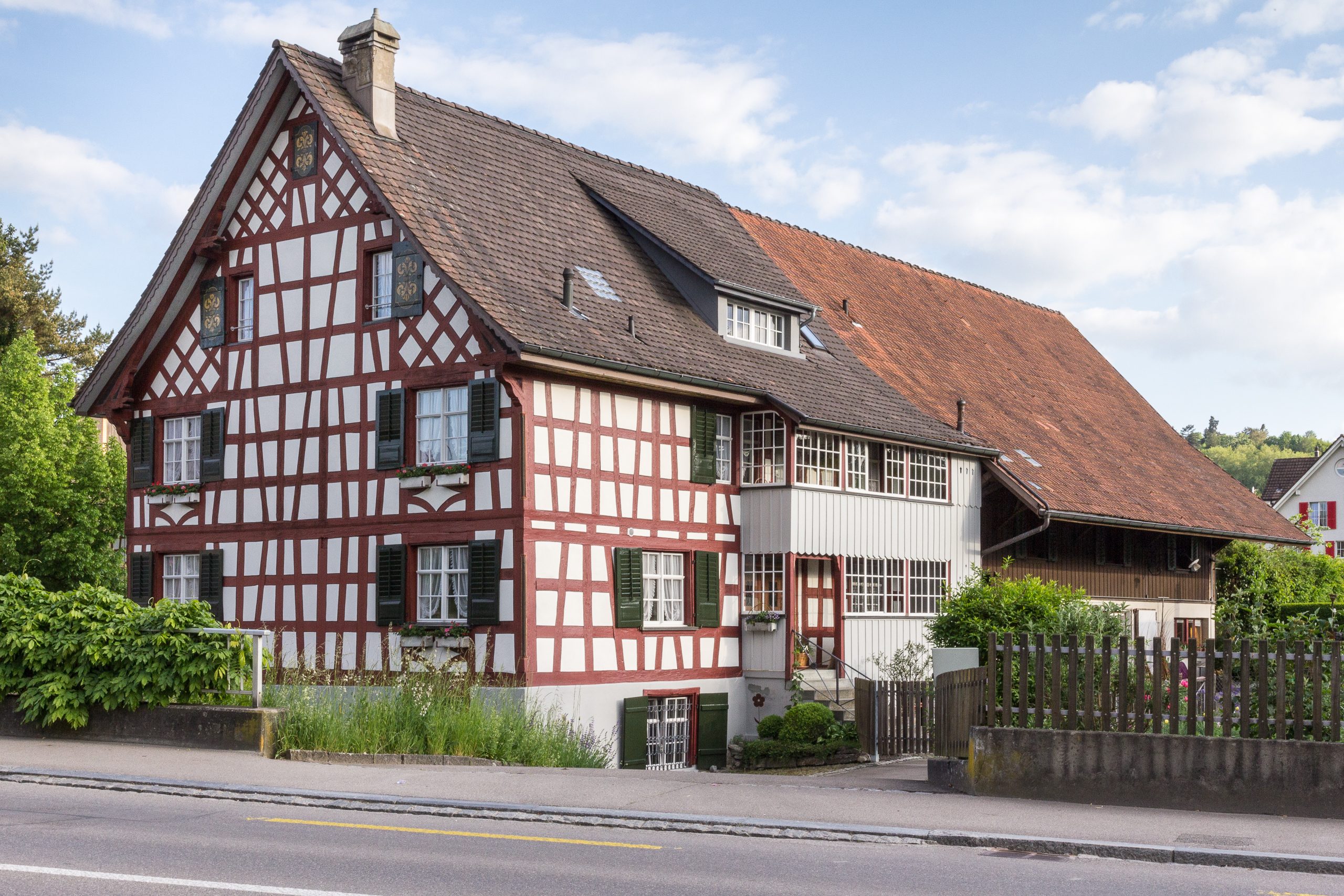 Geburtshaus von Hermann Müller(-Thurgau) in Tägerwilen TG, Müller-Thurgau-Strasse 2, Schweiz